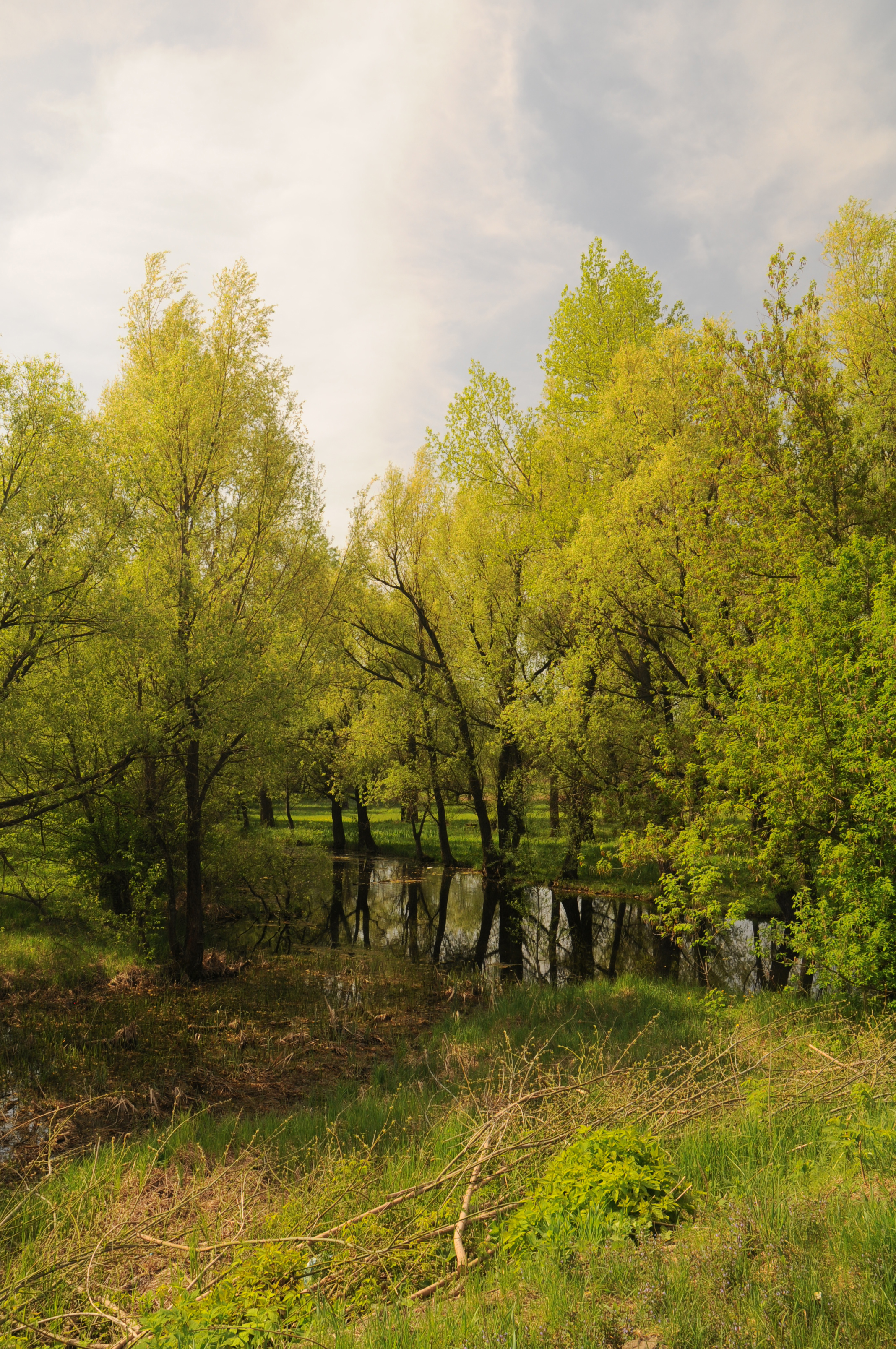 Котів яр, Шполянський район, с. Сигнаївка